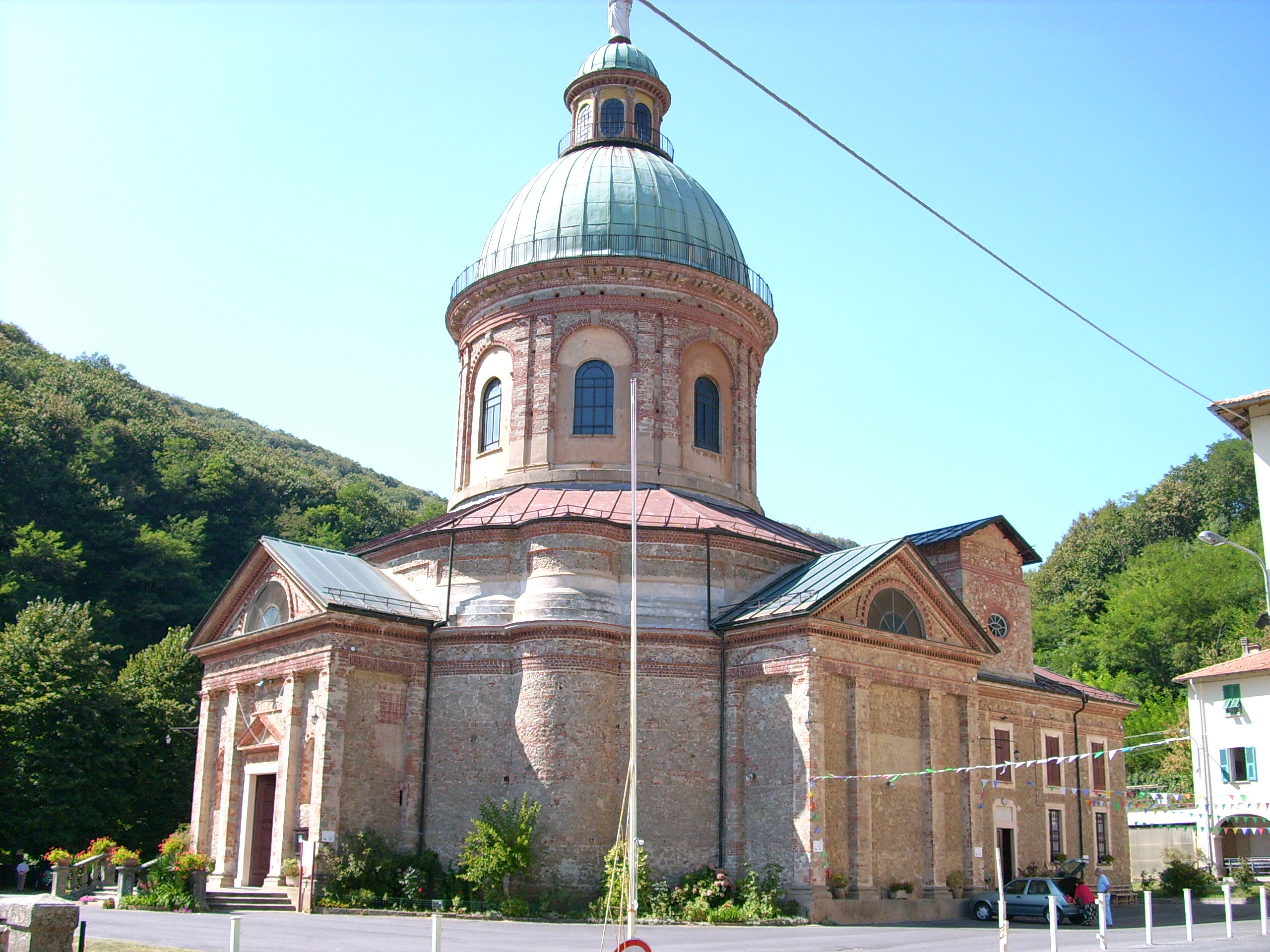 Santuario di Nostra Signora del Deserto di Millesimo, Liguria, Italia